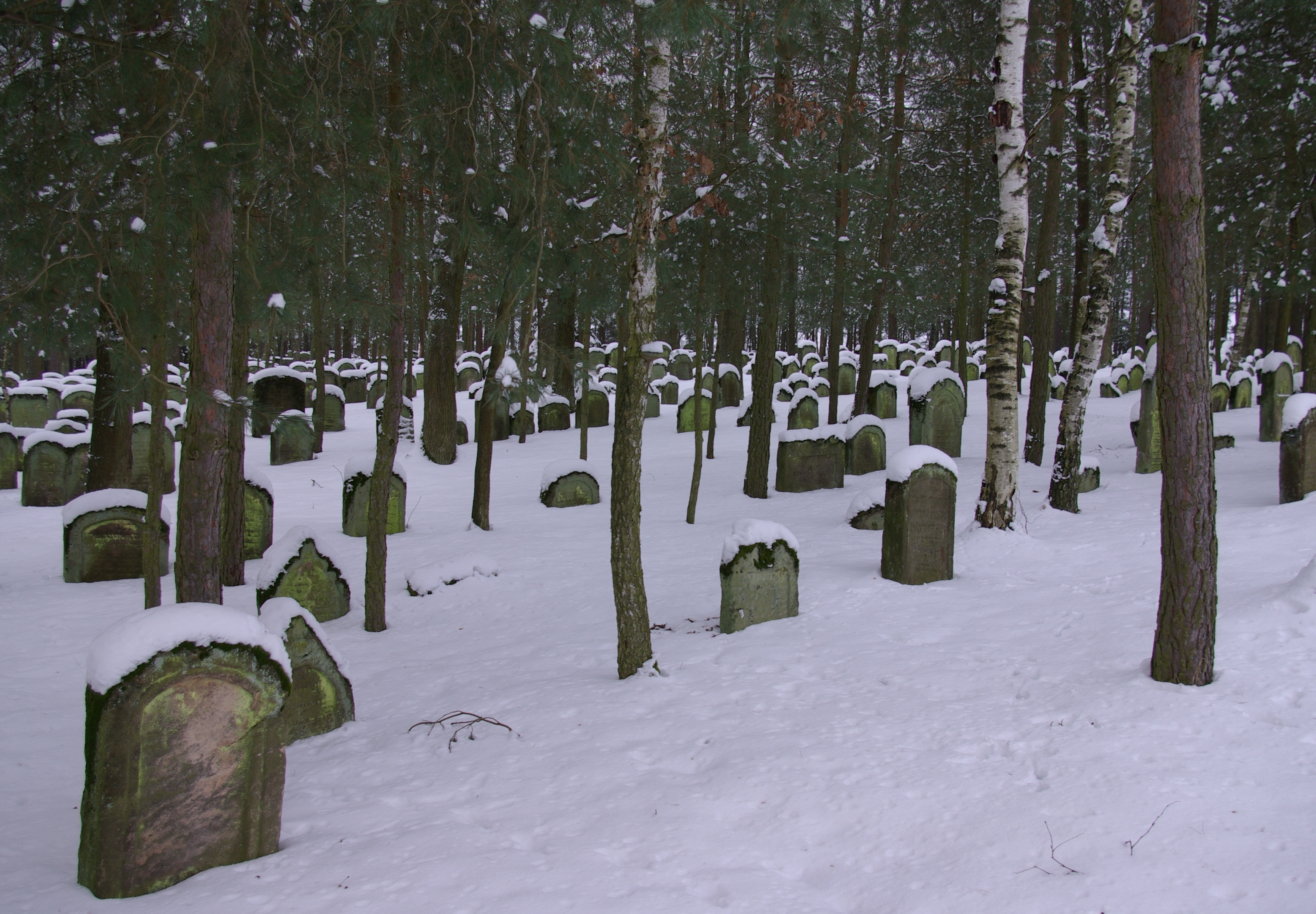 Jüdischer Friedhof in Zeckern, Gemeinde Hemhofen